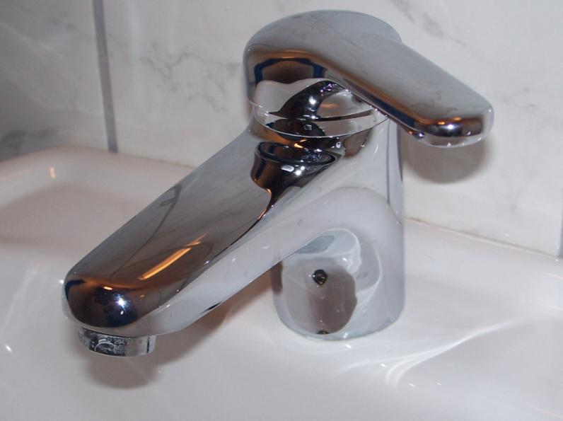 Einhebel-Mischbatterie